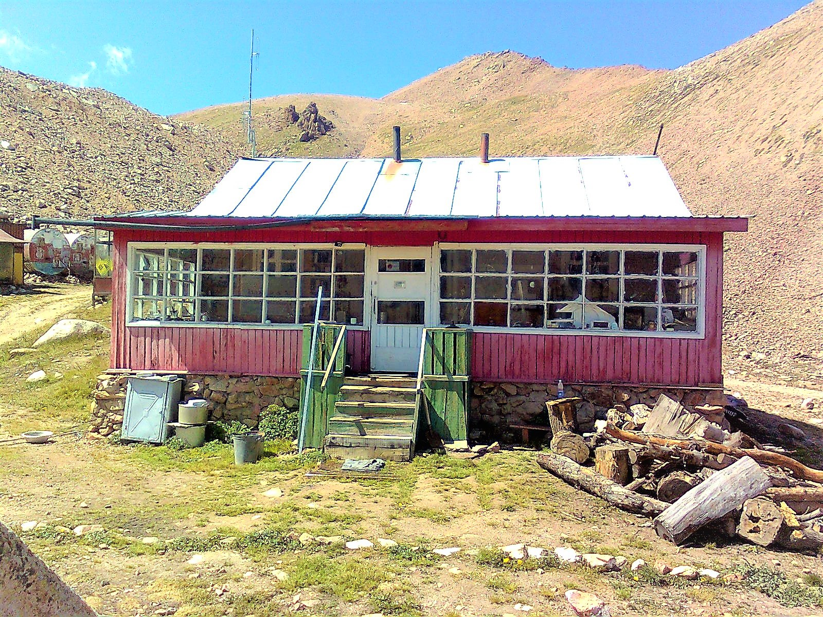 Дом наблюдателей